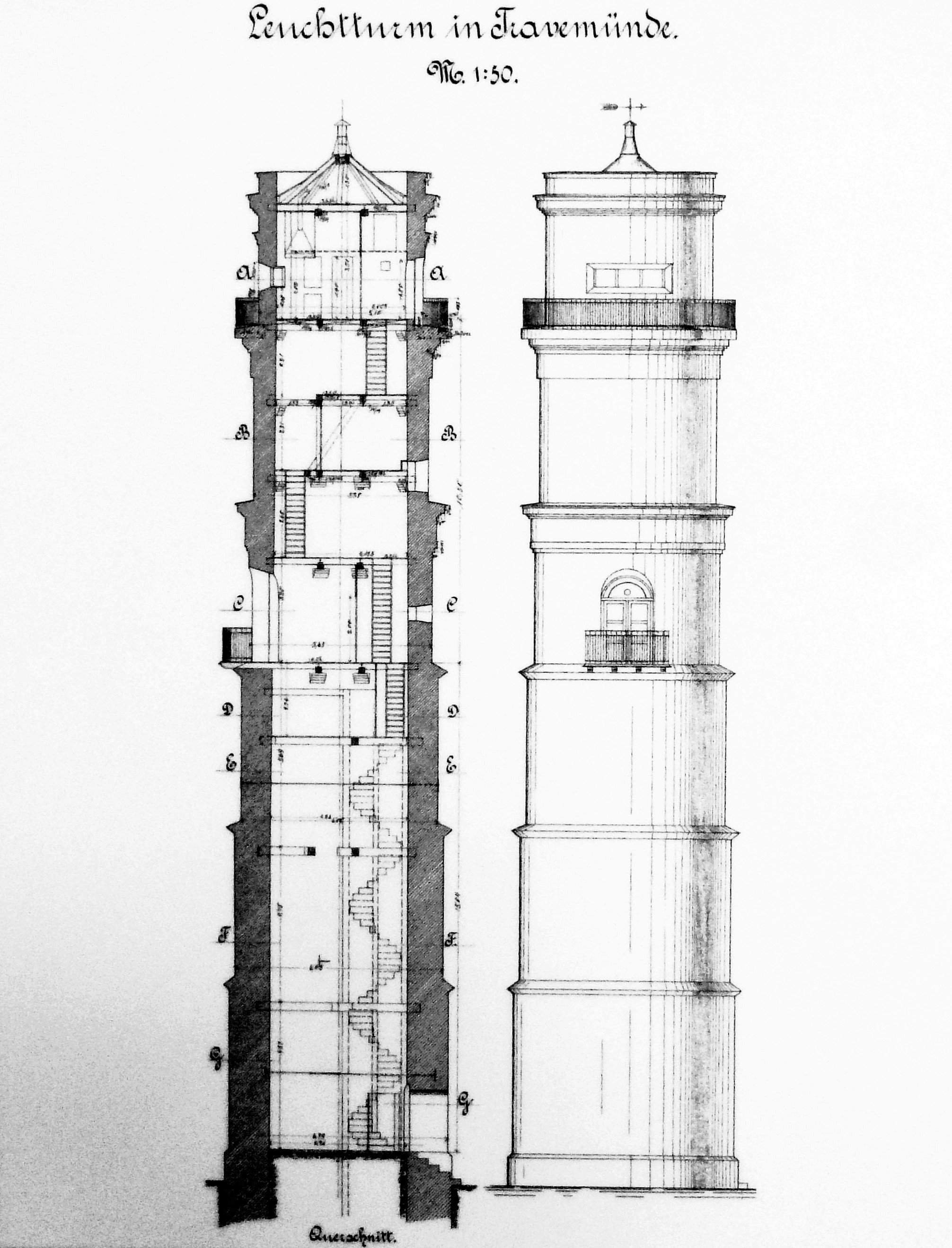 Leuchtturm Travemünde Original-Zeichnung